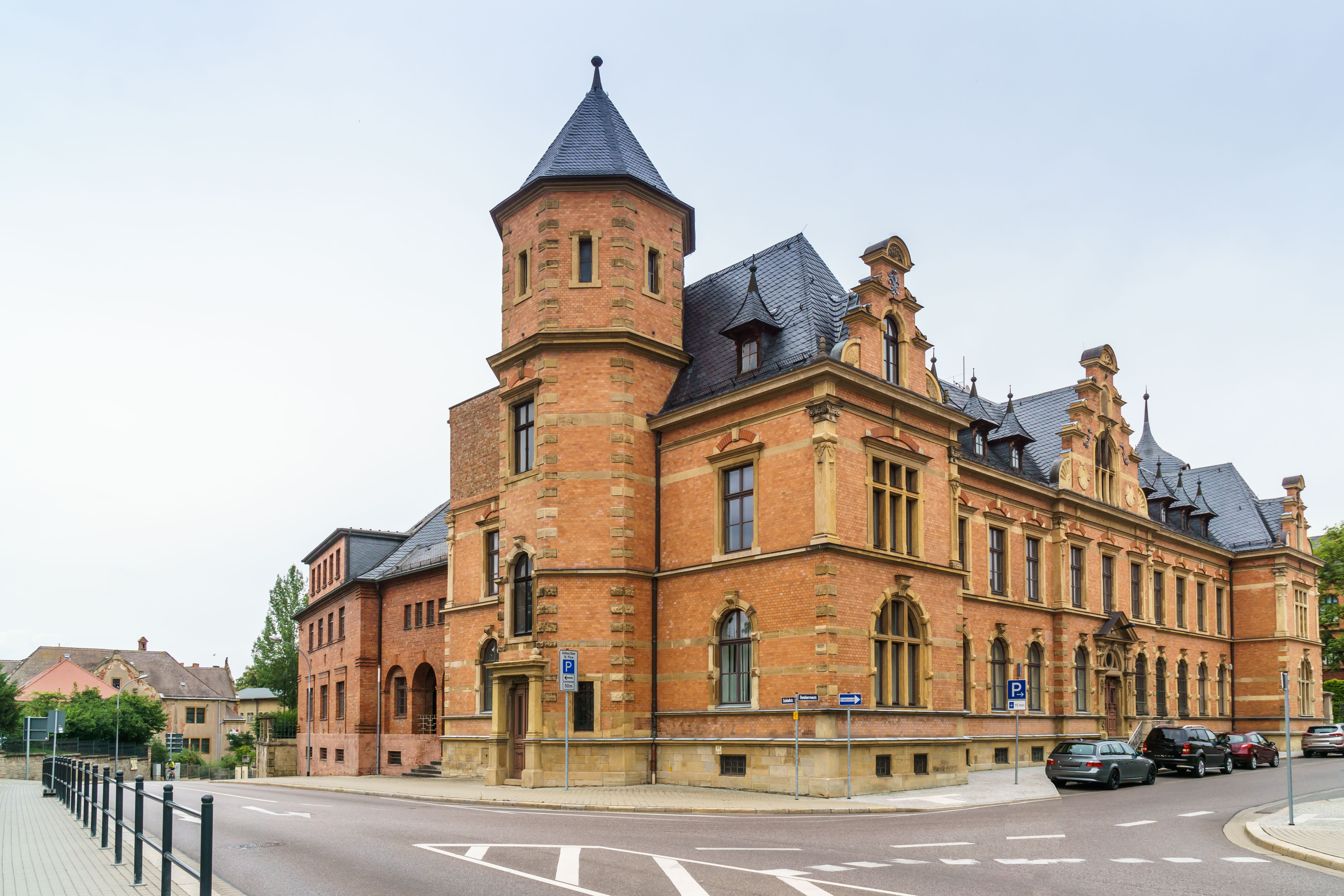 Postamt, Domherrenstraße 2, 3, 4 in Zeitz